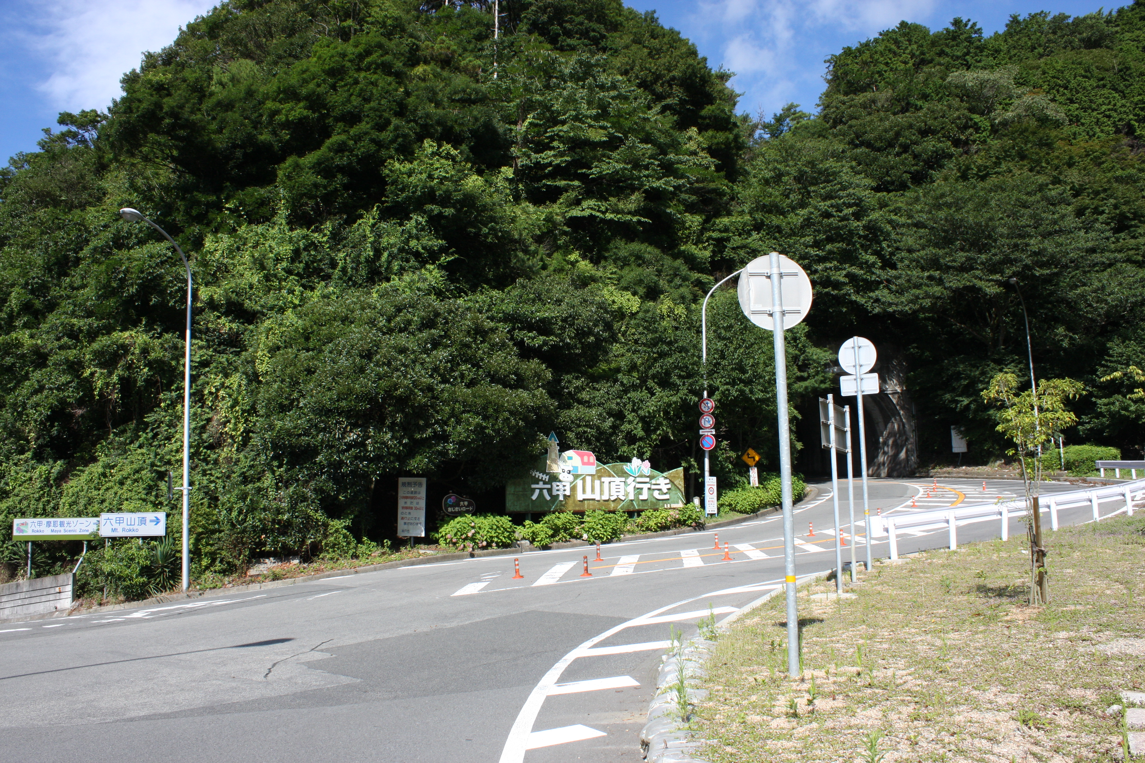 表六甲ドライブウエイ 入り口